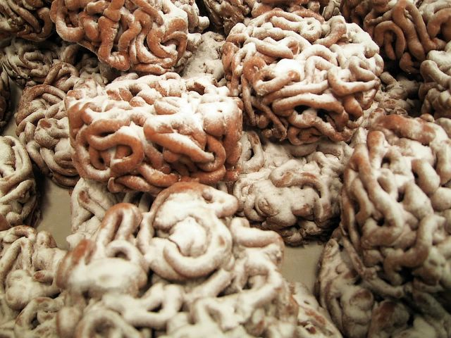 Funnel cakes